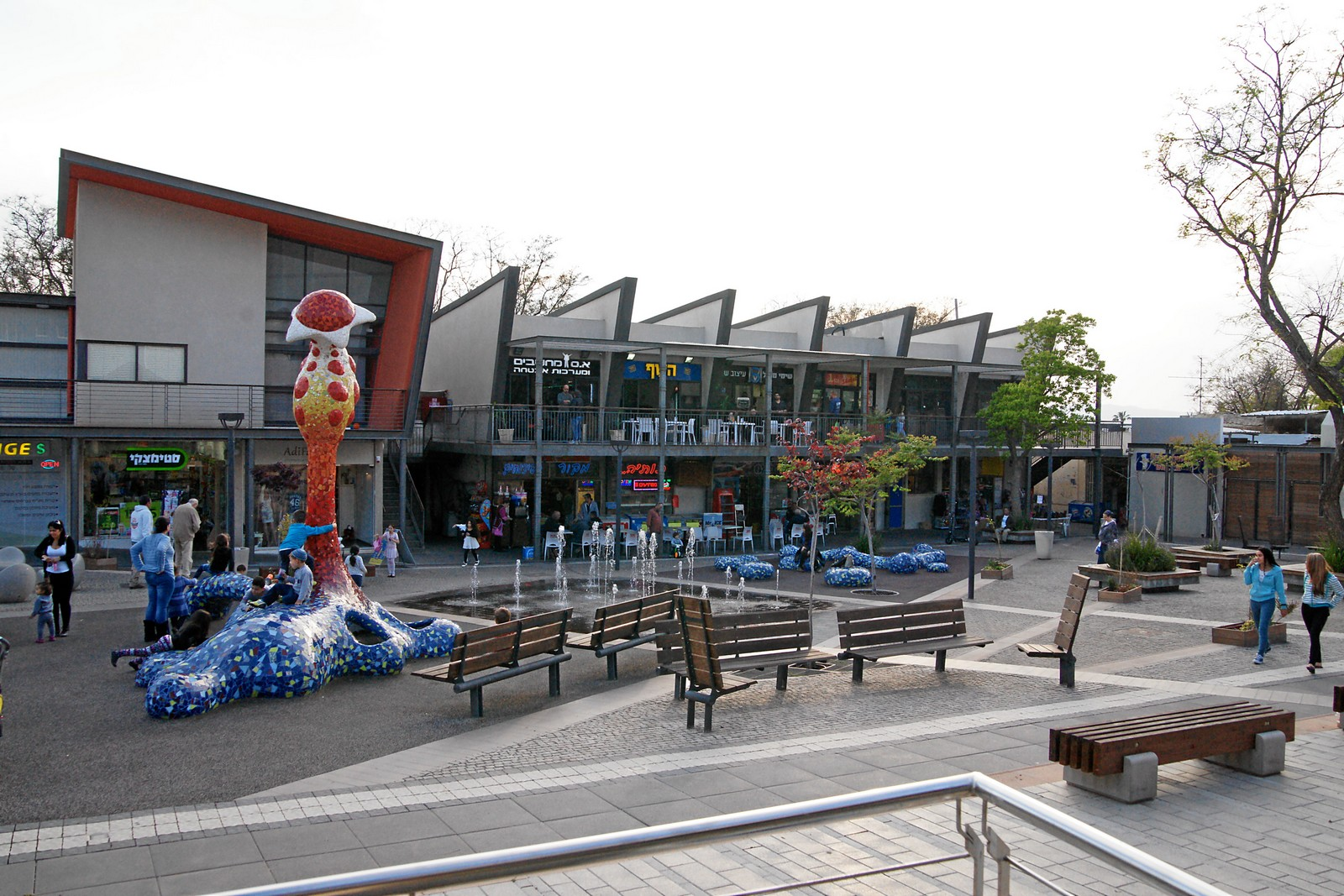 Katzrin: City centre